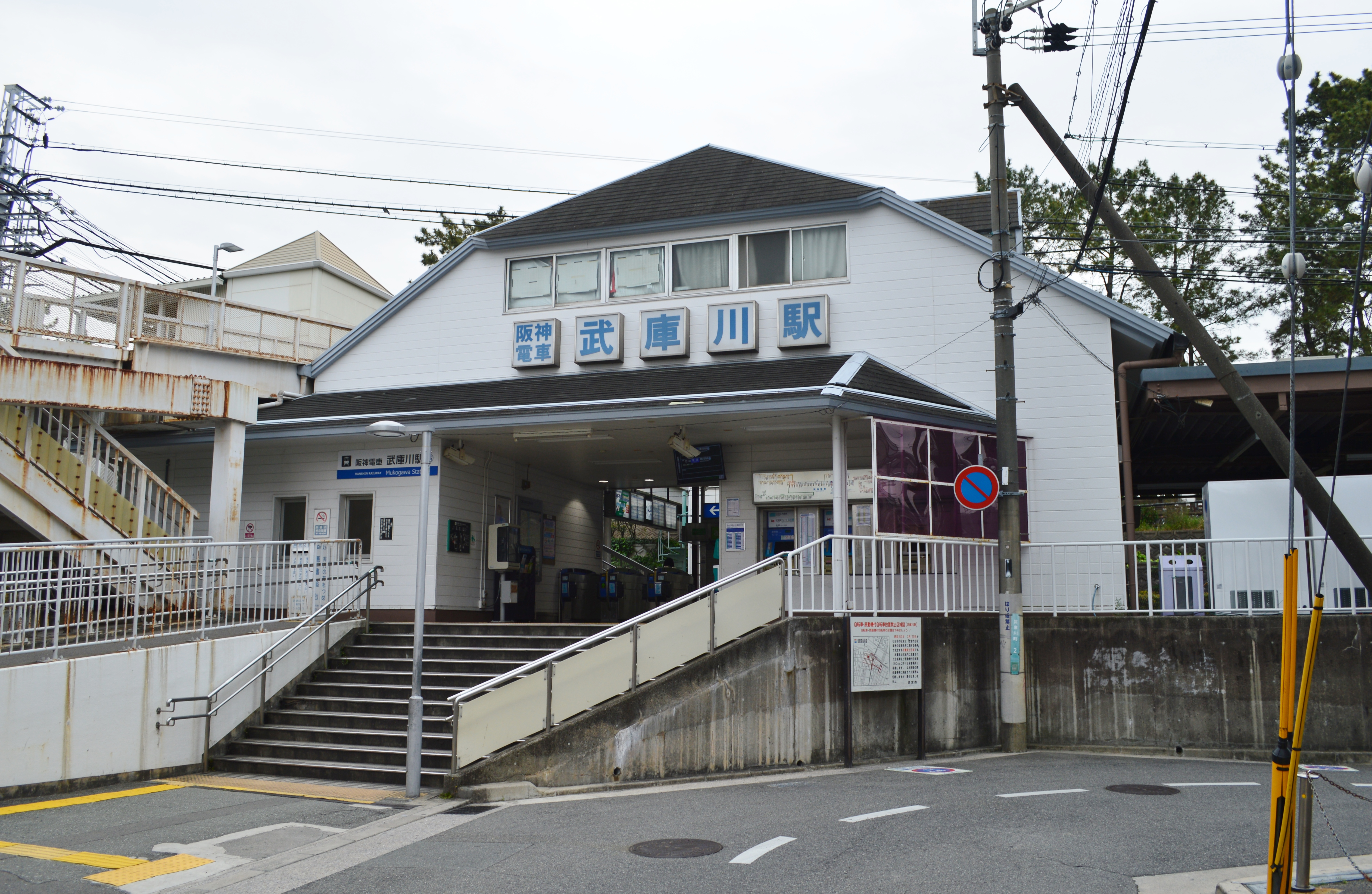 武庫川駅 駅舎